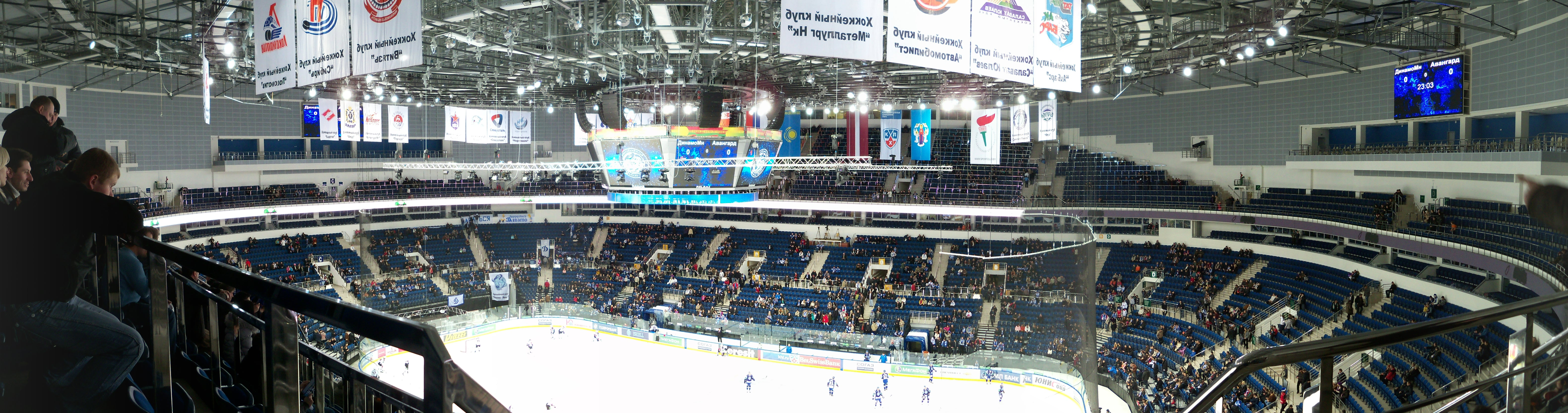 Внутренняя панорама хоккейной площадки Минск-Арены